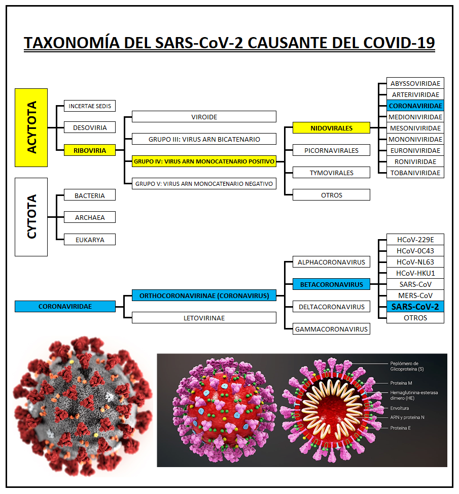 Representa la taxonomía del virus SARS-CoV-2 descubierto a fines del año 2019.